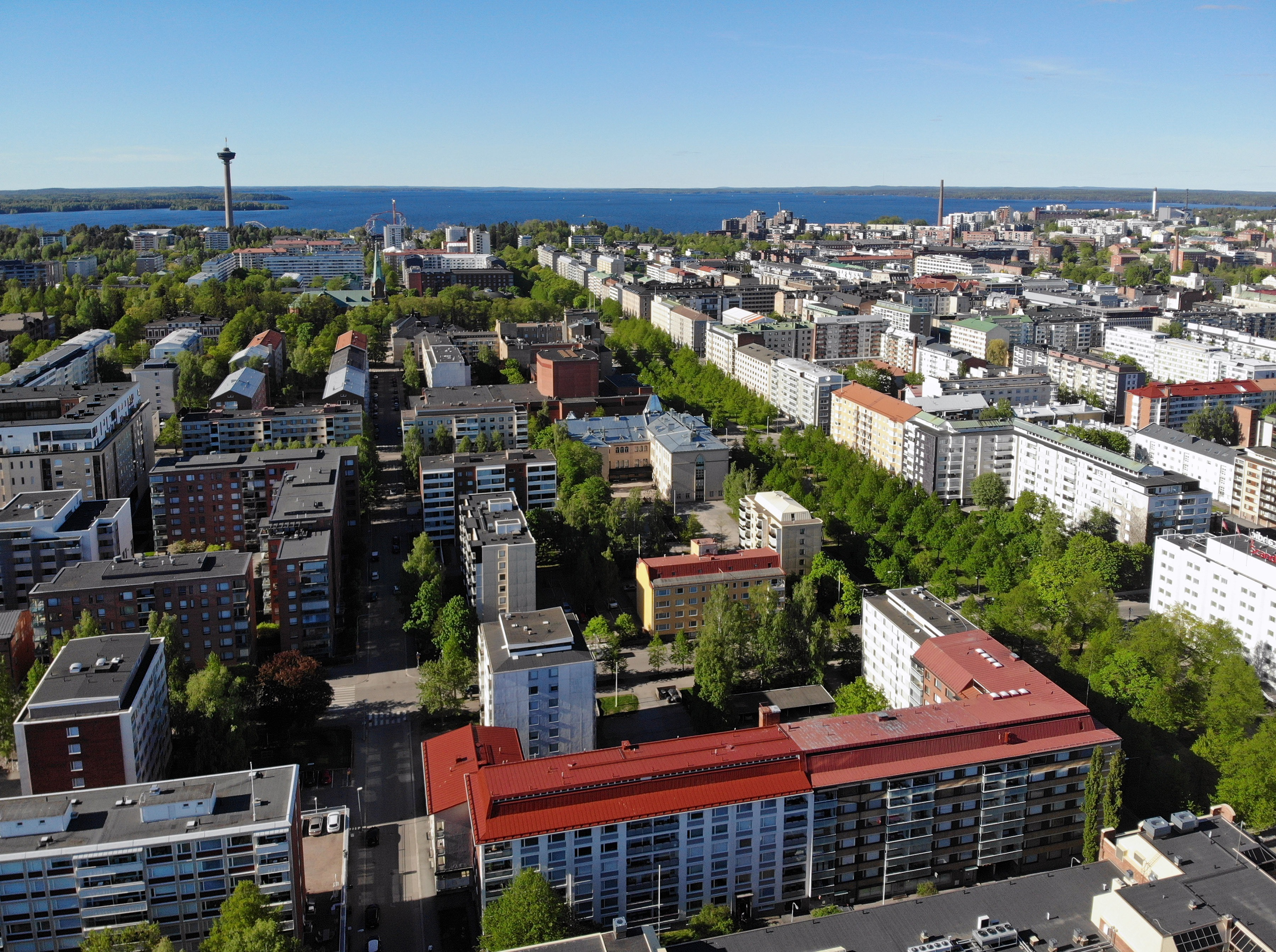 Tampereen Hämeenpuisto.